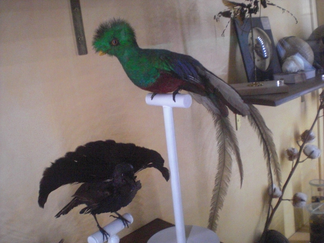 Birdoj en Muzeo de Naturaj Sciencoj: kecalo